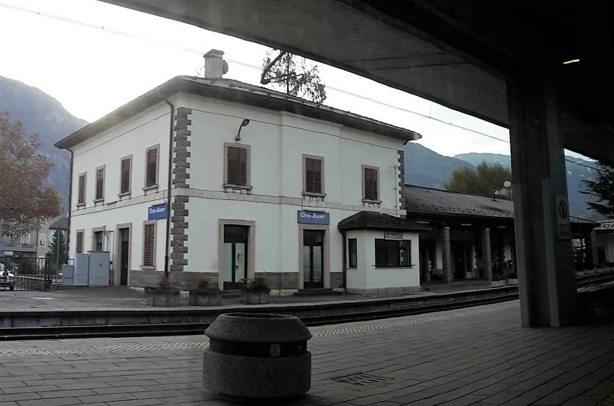 Stazione di Ora (BZ), lato binari.